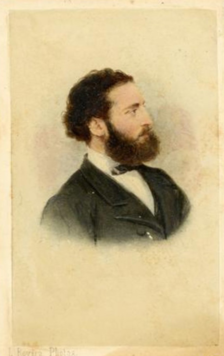 Retrato de Gaudí en 1878, por Leopoldo Rovira.